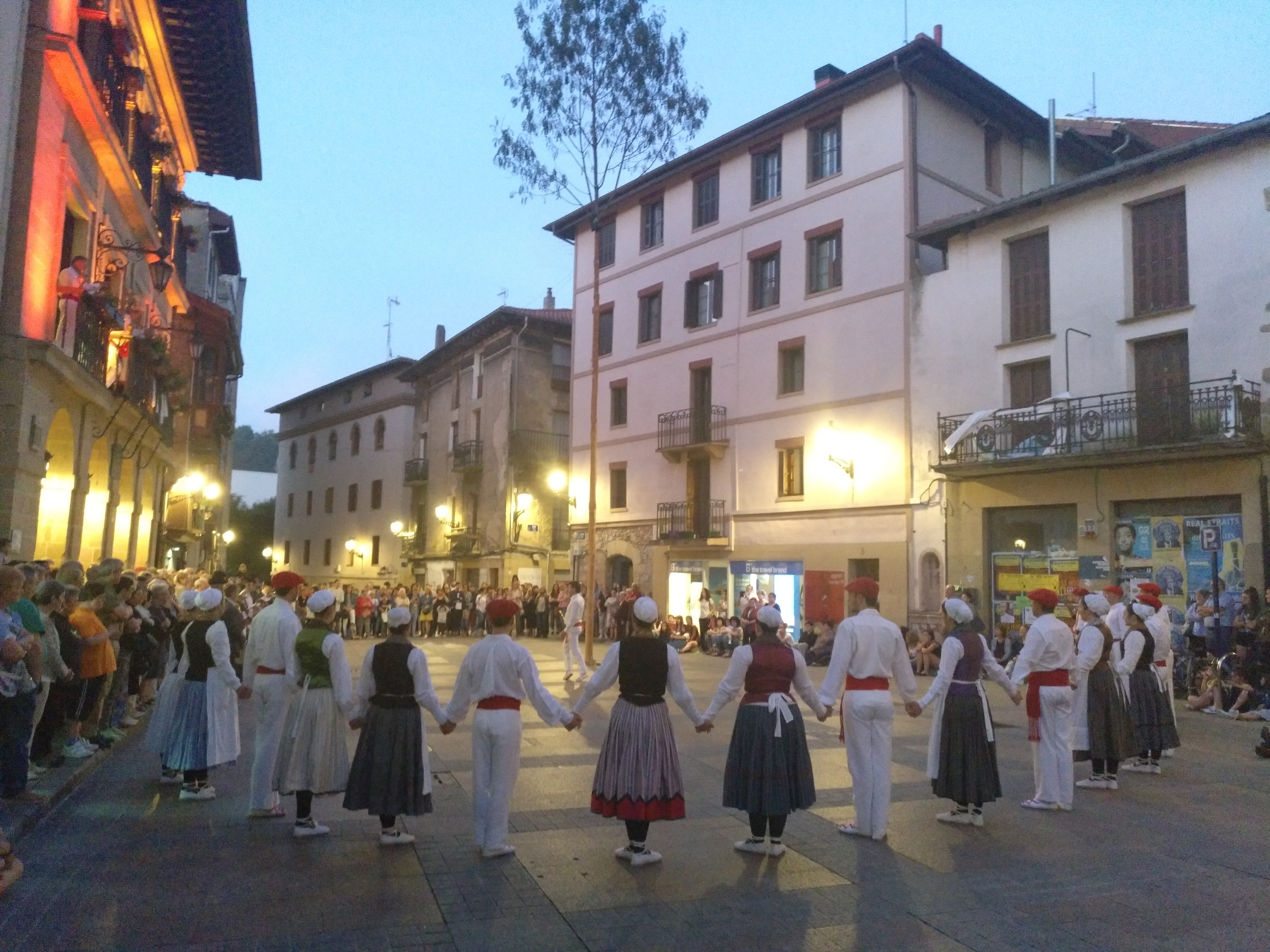 2011tik berreskuratuta, alkate eta zinegotziek soka dantzan parte hartzen dute Donibane bezperan Herriko plazan. Argazkian Julen Mendoza alkatea herriari dantza eskeintzen.